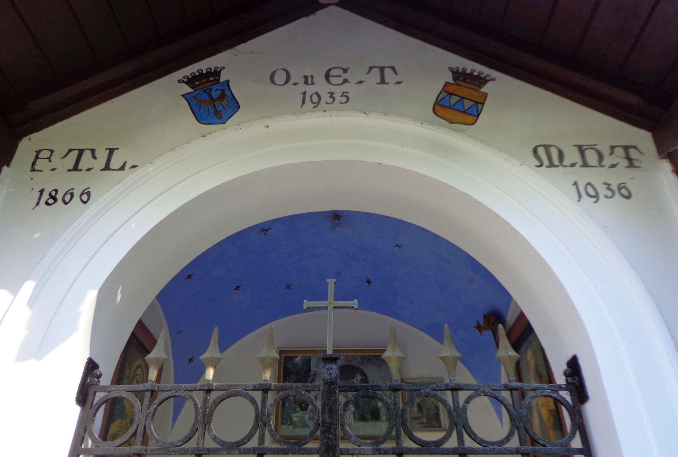 Gmunden, Österreich: Trauttenberg-Wegkapelle beim Haus Friedrich-Hebbel-Straße 15